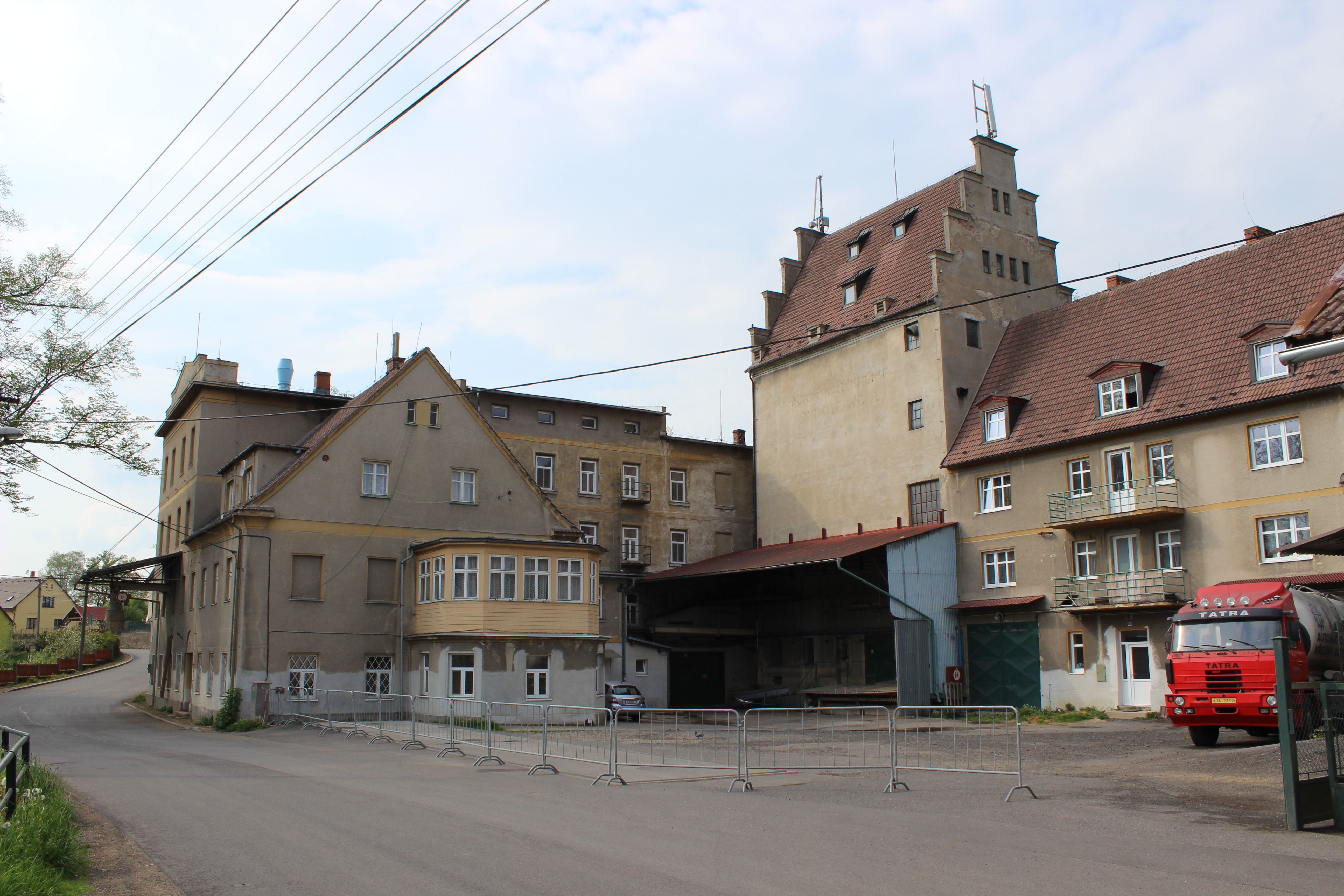 Automatický mlýn v raspenavském domě číslo popisné 103 (pohled od jihovýchodu).